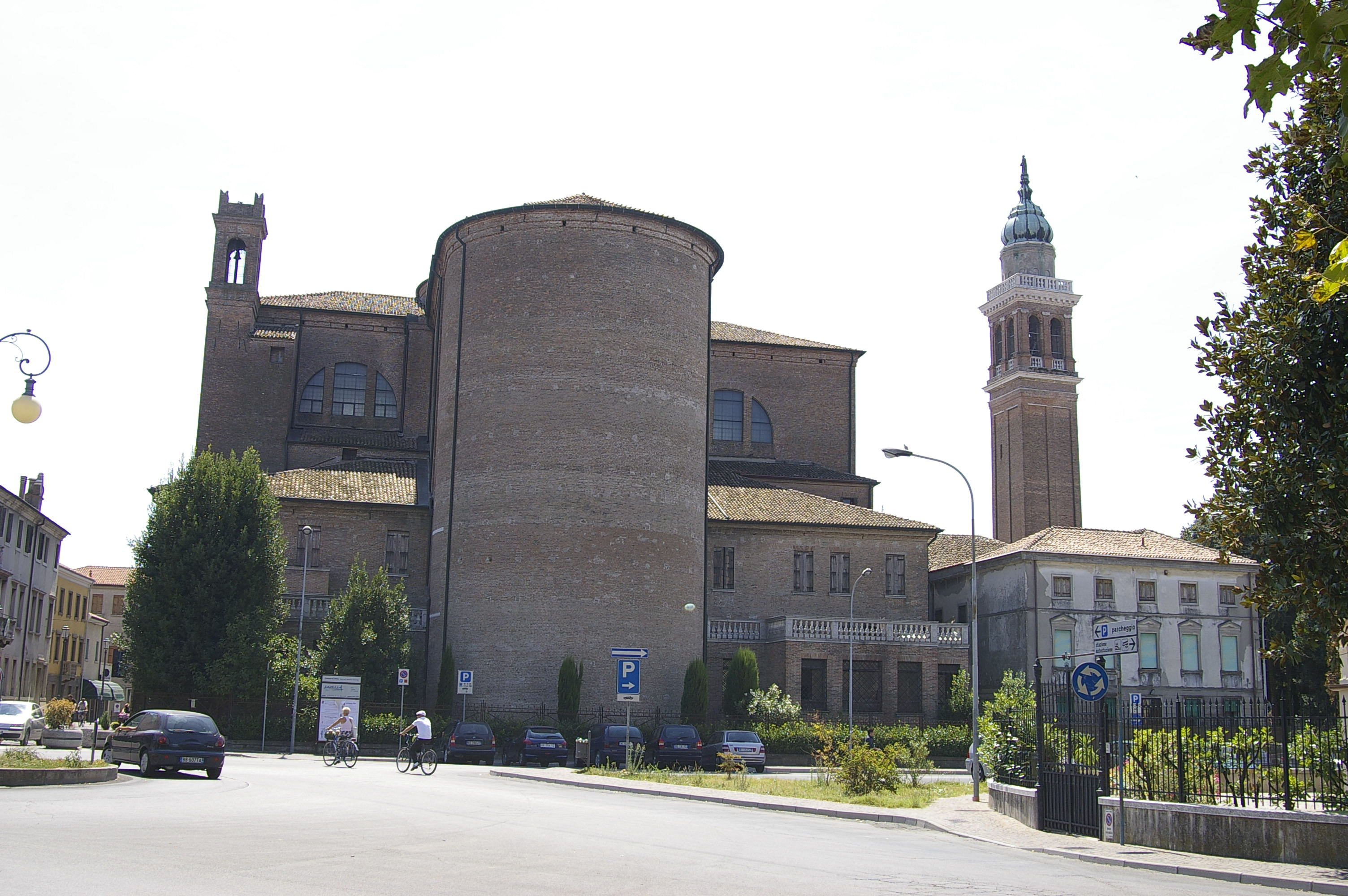 abside del duomo di Adria